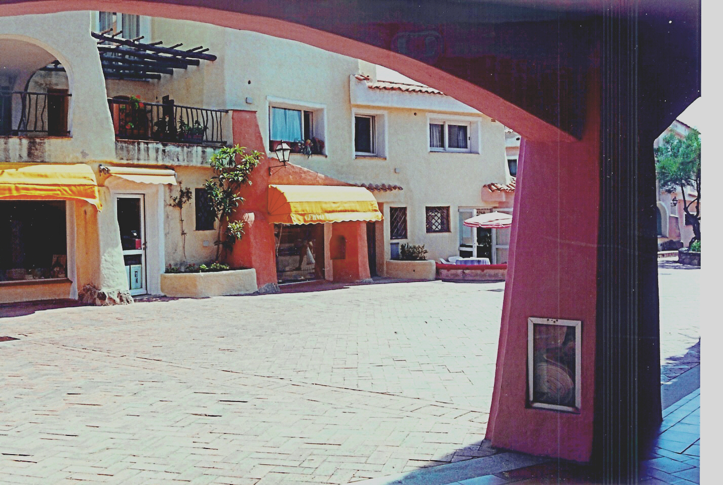 Porto Cervo.